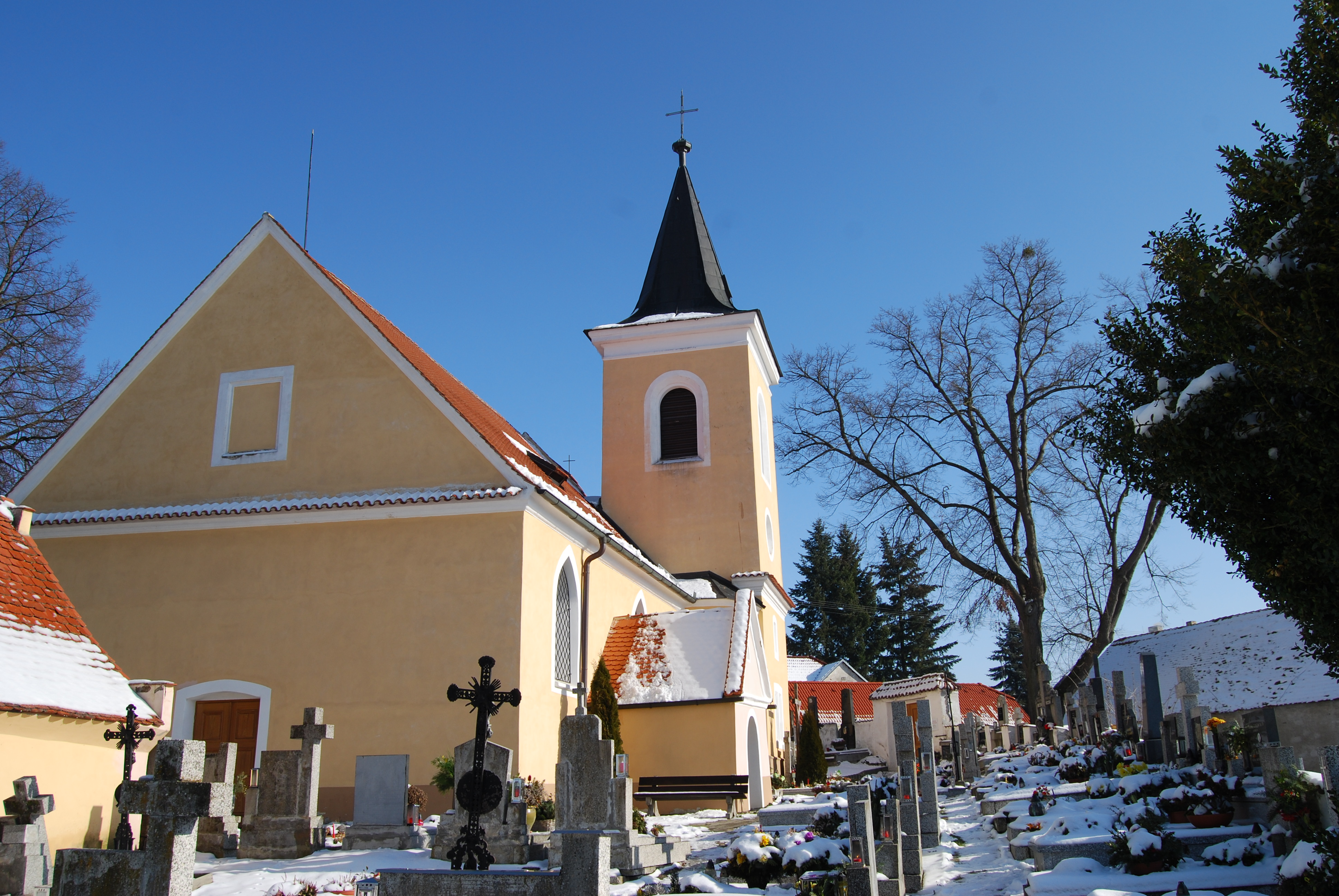 Kostel sv. Vavřince. Kostelec je vesnice, část města Hluboká nad Vltavou v okrese České Budějovice. Česká republika. - Google Maps - Google Earth